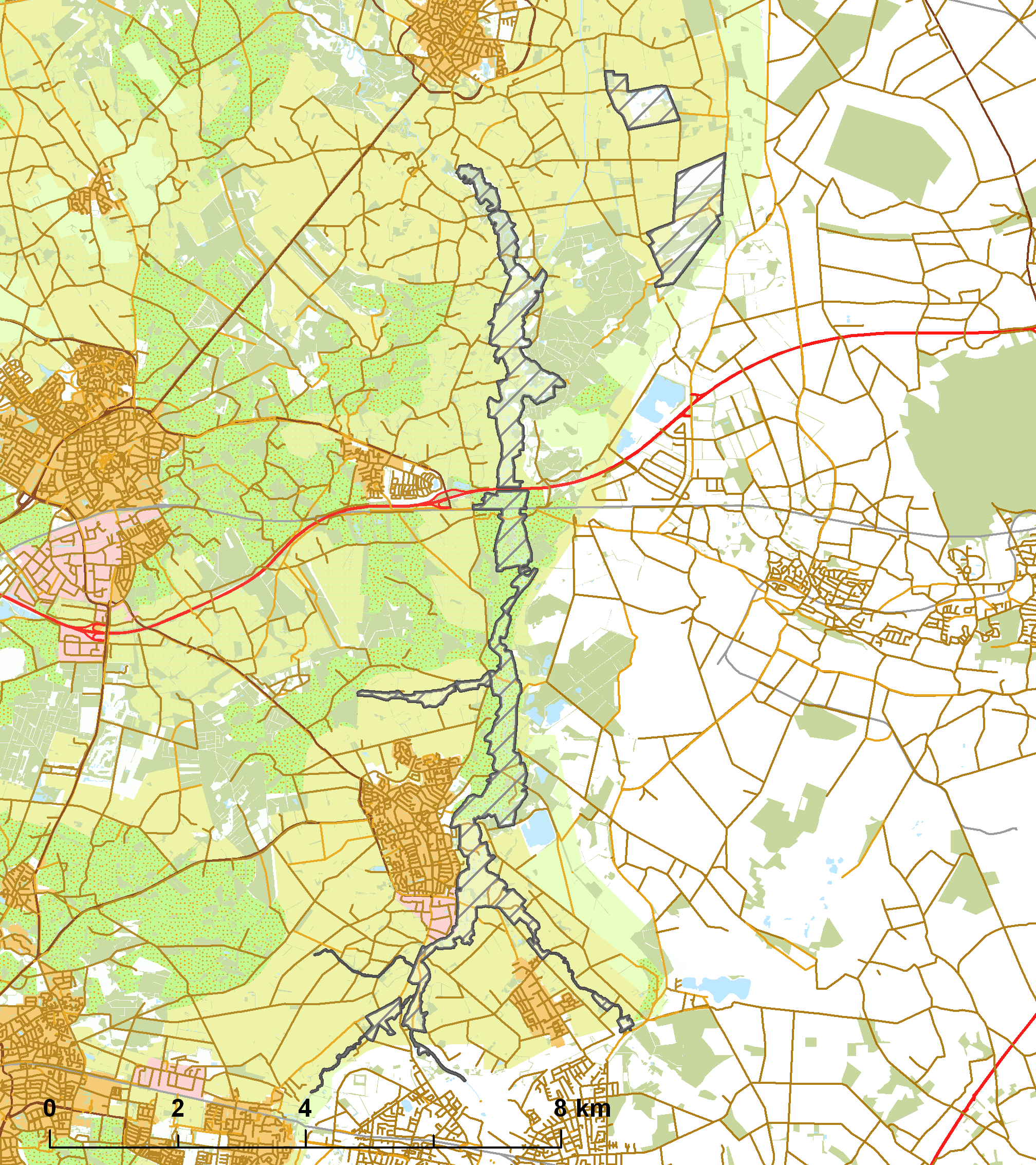 Natura2000 - Dinkelland.png